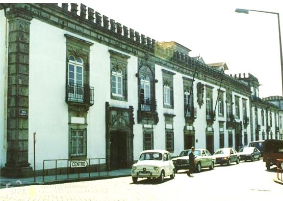 Casa da Carreira - Casa da Família Távora de Abreu e Lima em Viana do Castelo Actuais Paços do Concelho de Viana do Castelo